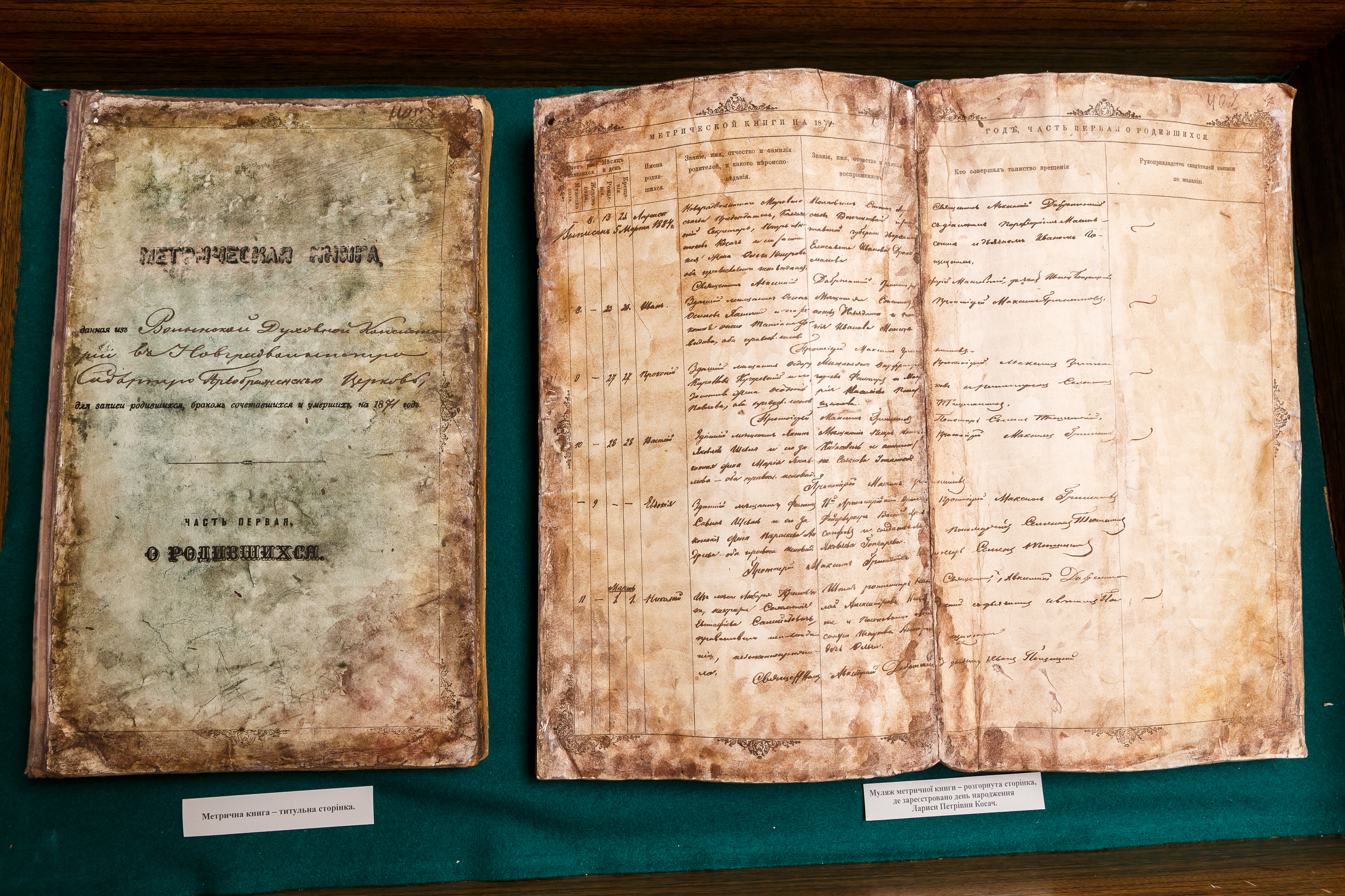 Запис у метричній книзі про хрещення Лариси Косач. Фотограф Юрій Зубрицький. Новоград-Волинський.